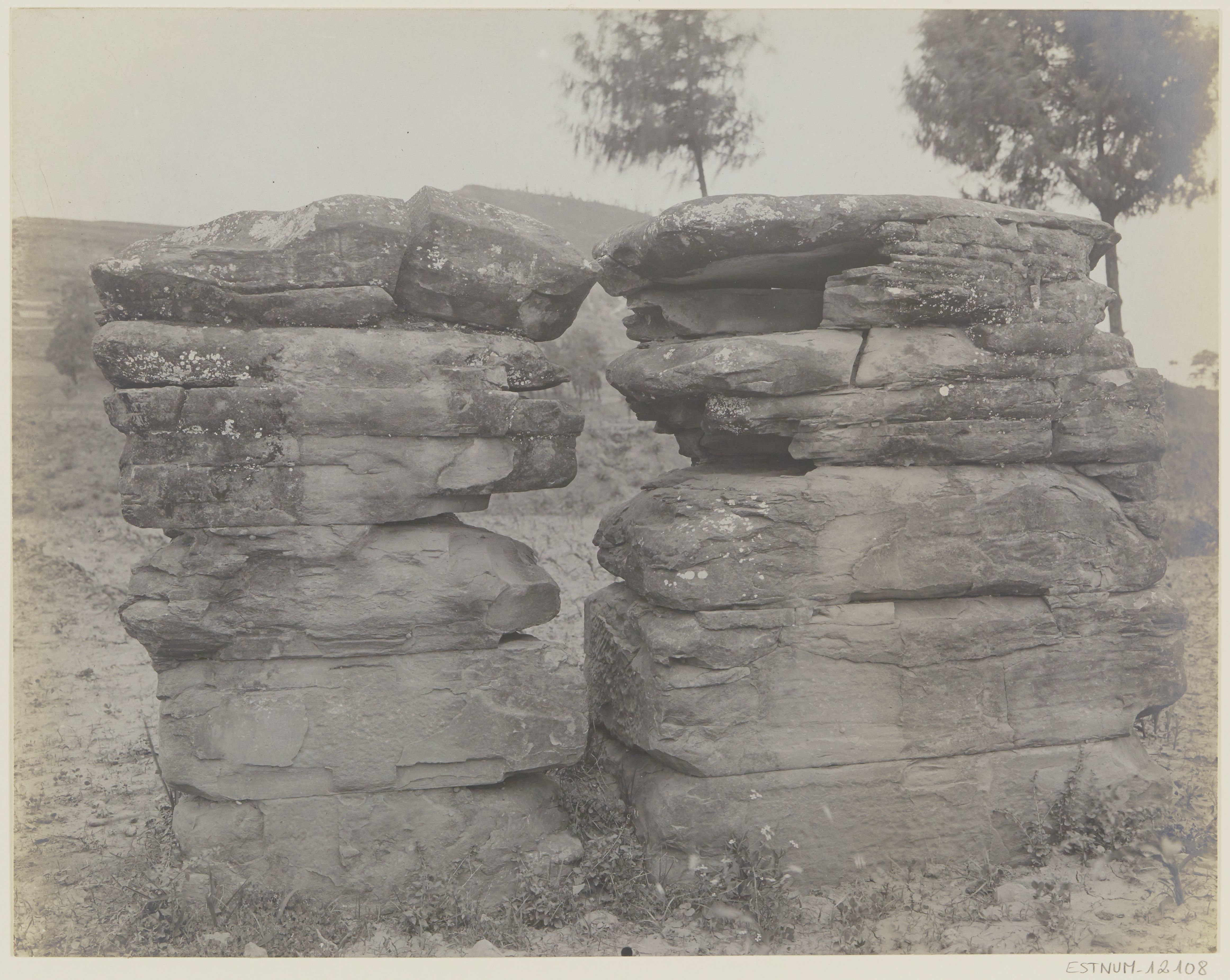 中文（台灣）: 梓潼漢代四闕